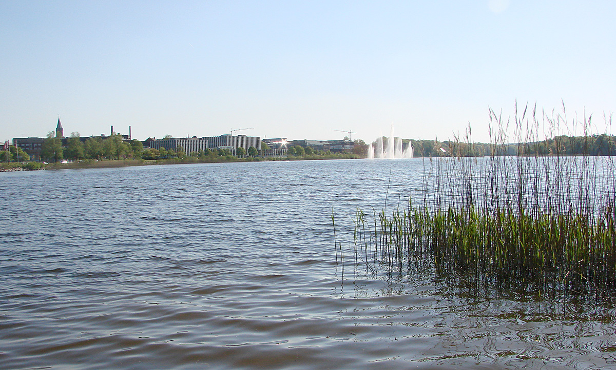 Søen set mod sydvest med Silkeborg Kirke, Rådhuset, springvandet og til højre , bag sivene set spidsen af Odden Silkeborg Langsø, Jylland, Denmark